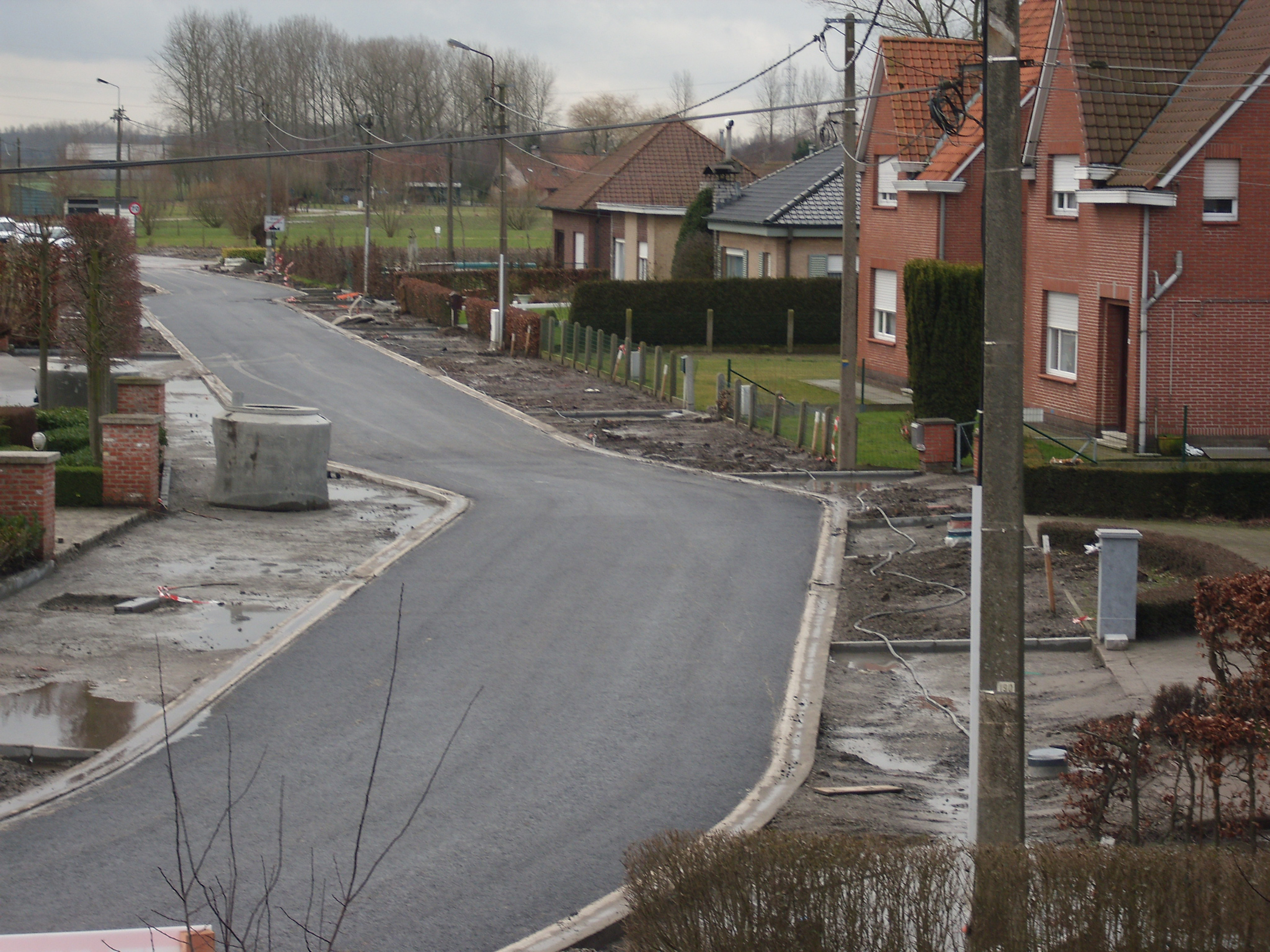 Vrekkemstraat - Ursel - Knesselare - Oost-Vlaanderen - Vlaanderen - België